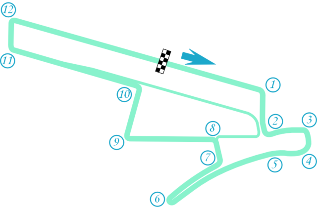 Circuito di formula e a Stantiago del Cile.